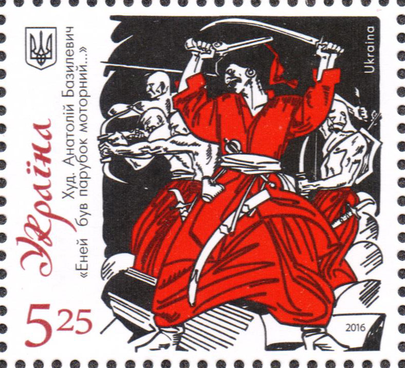 Марка України «„Еней був парубок моторний…“ Худ. Анатолій Базилевич»